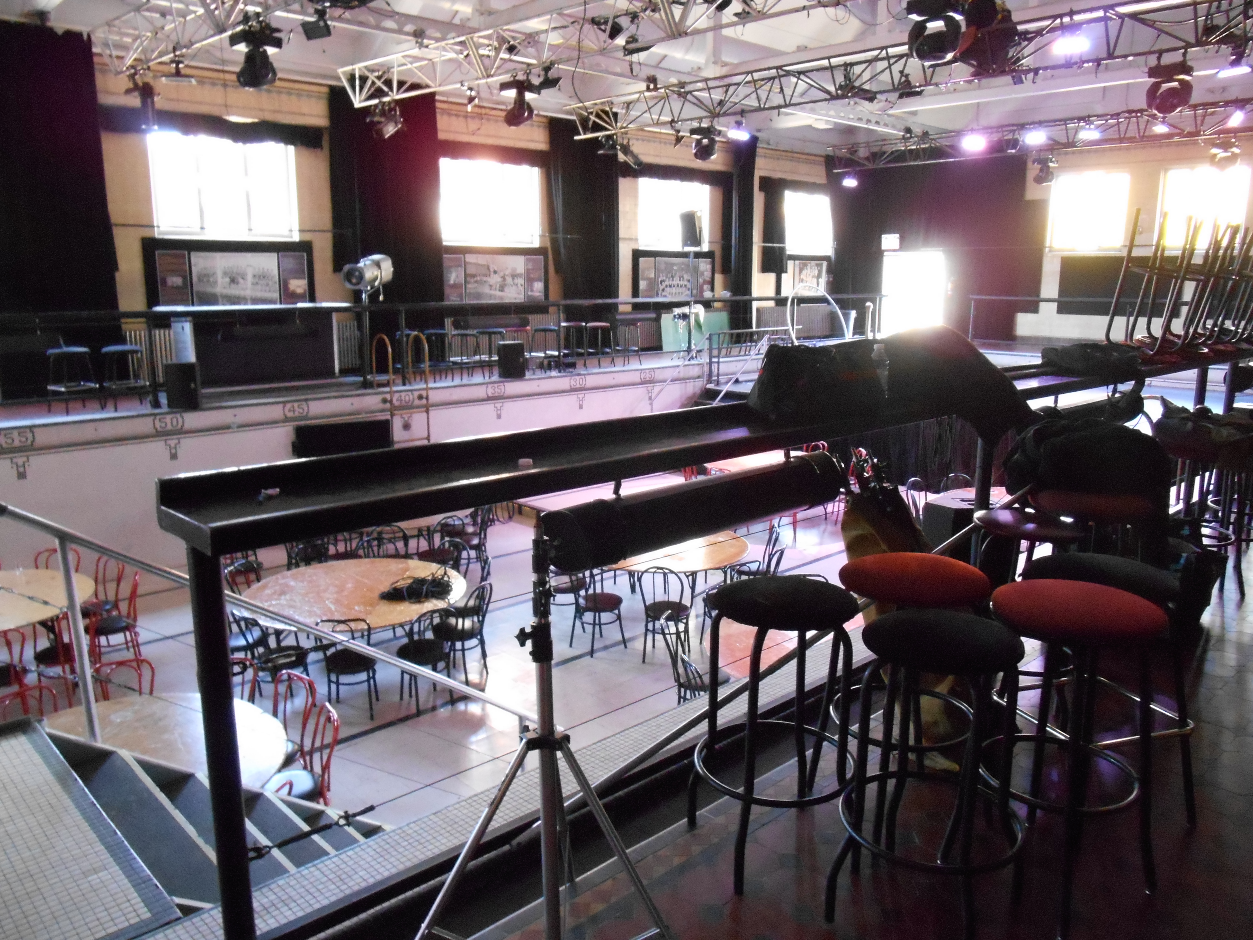 Le Bain Mathieu, construit en 1931, est un ancien bain public de Montréal, situé au 2915, rue Ontario Est.